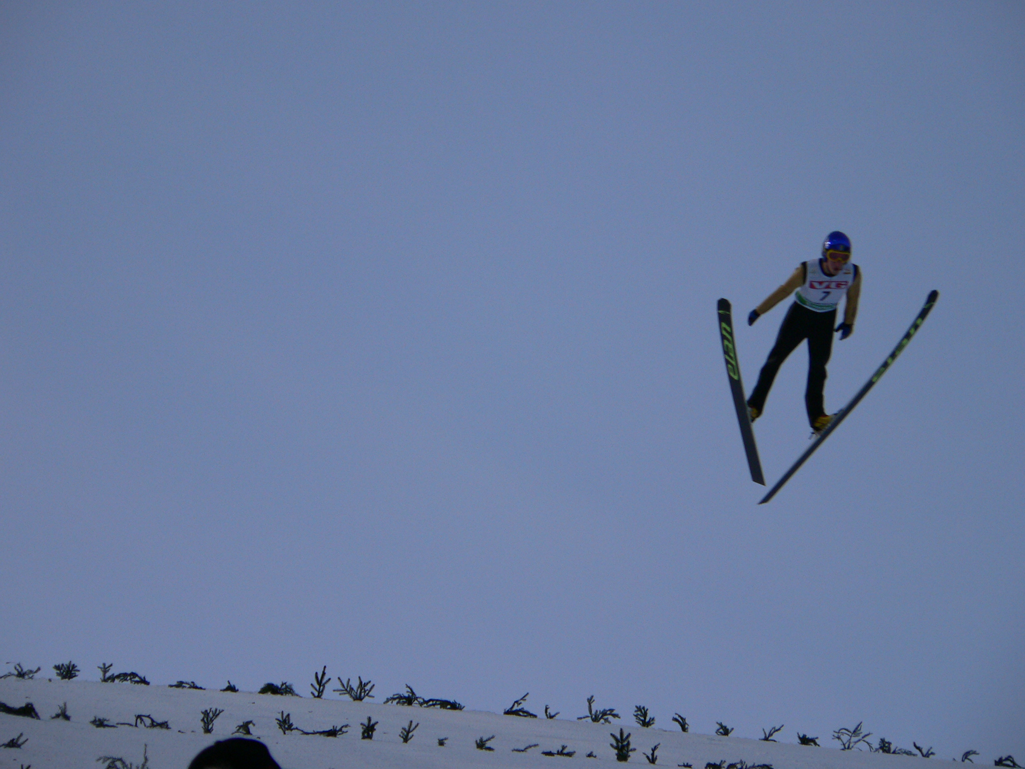 Isak Grimholm, taken at the WC event in Holmenkollen in 2005.